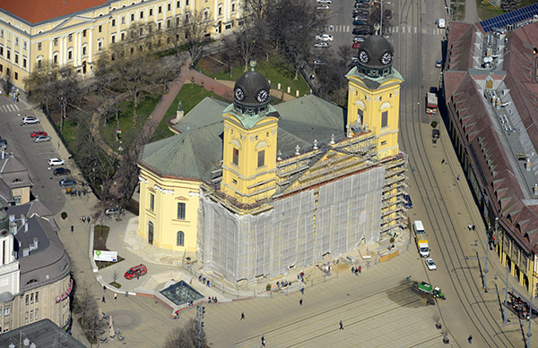 Református nagytemplom, Debrecen, légi fotó